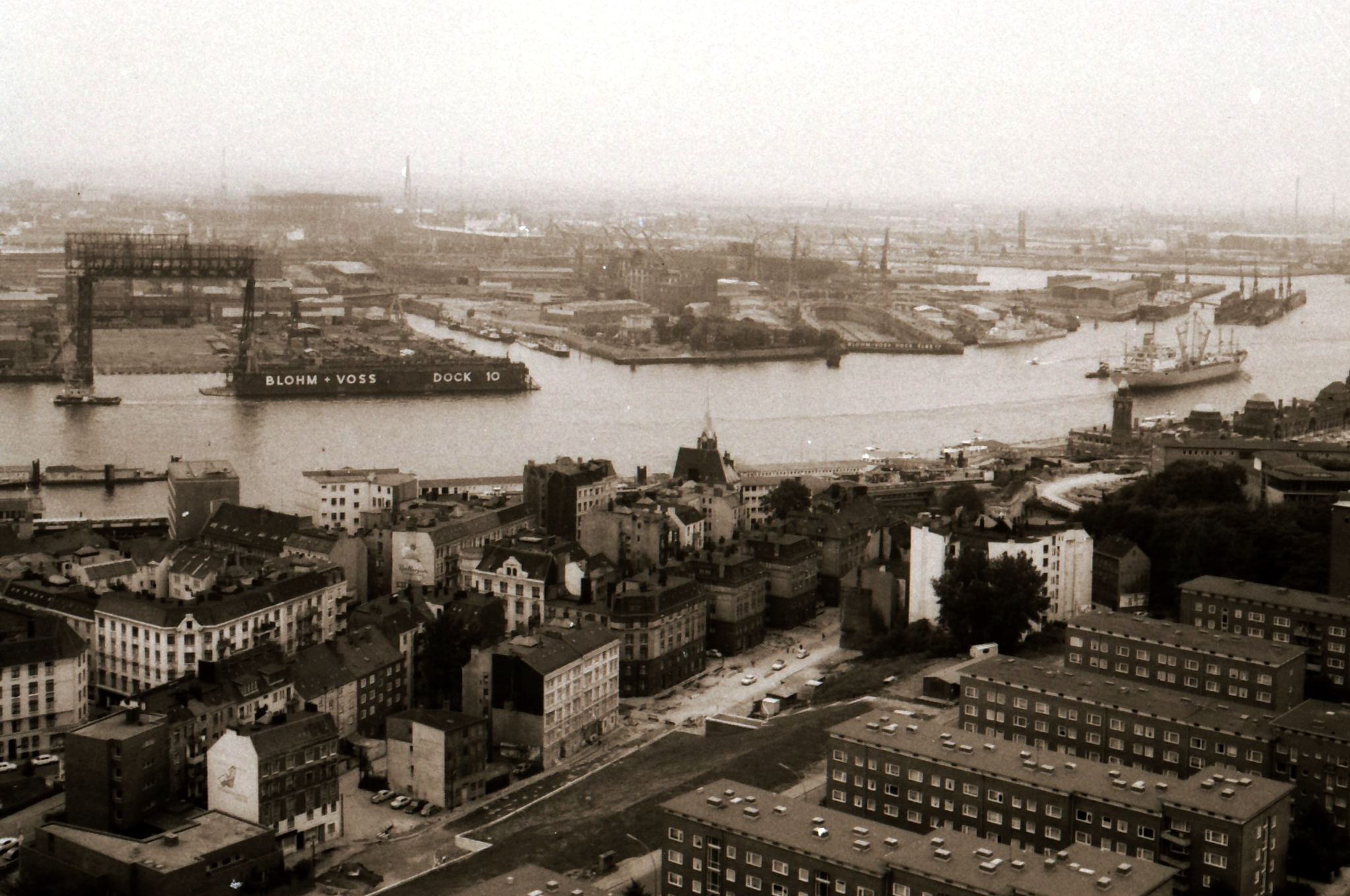 Blick über den Hamburger Hafen im Herbst 1972 vom Turm der St. Michelis-Kirche. Links im Bild die Helligen und Dock 10 der Schiffswerft Blohm + Voss, vormals Standort der Stülcken Werft.